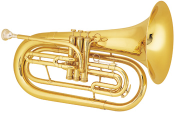 Marchingbaritone.jpg